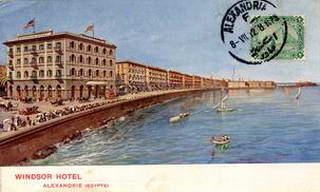 Windsor Hotel 1912 .. still stands till today